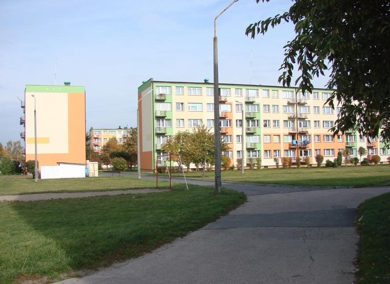 Osiedla Kardynała Stefana Wyszyńskiego